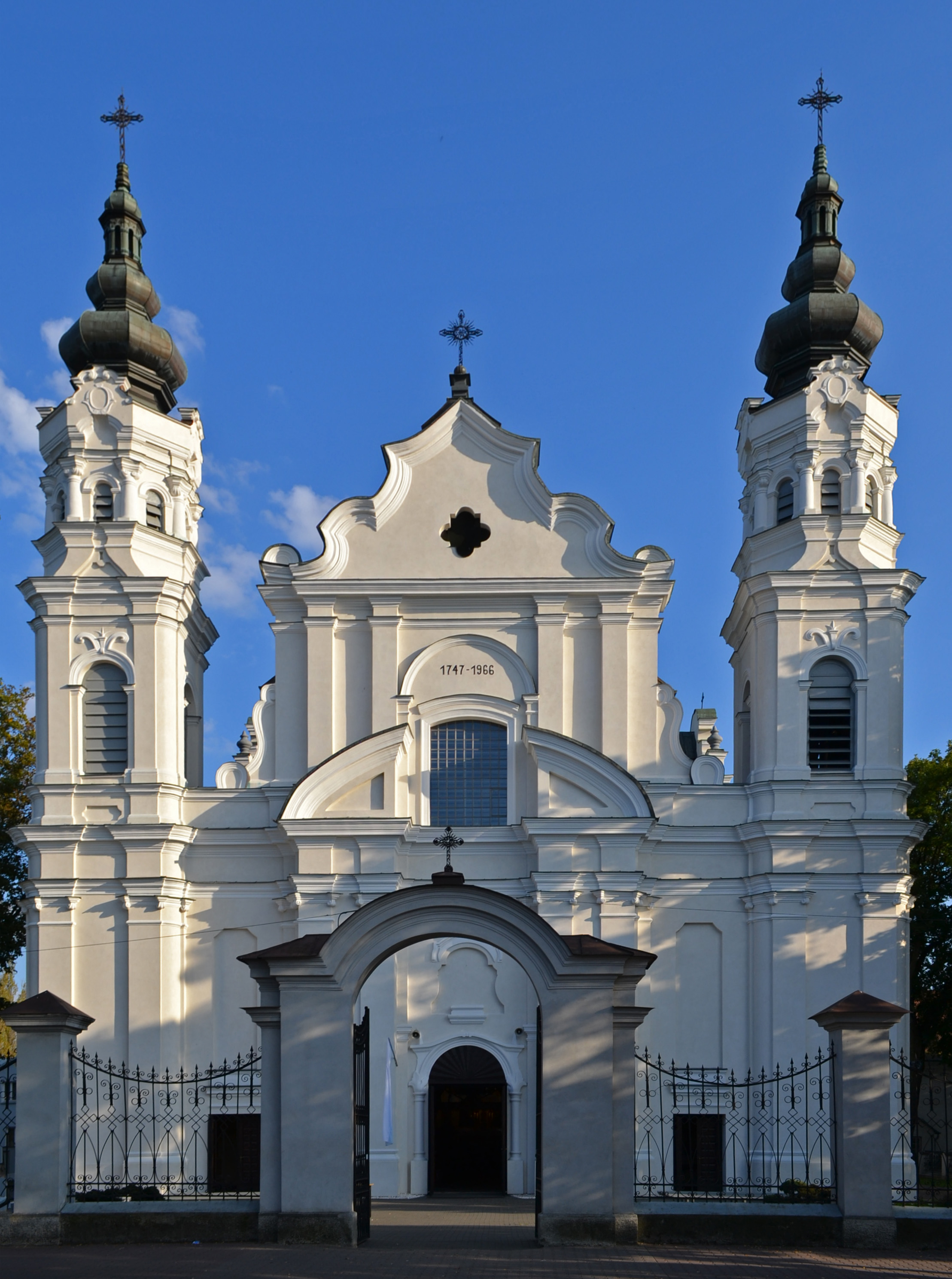 Biała Podlaska, kościół, ob. par. pw. św. Józefata, kon. XVIII, XIX, XX w.